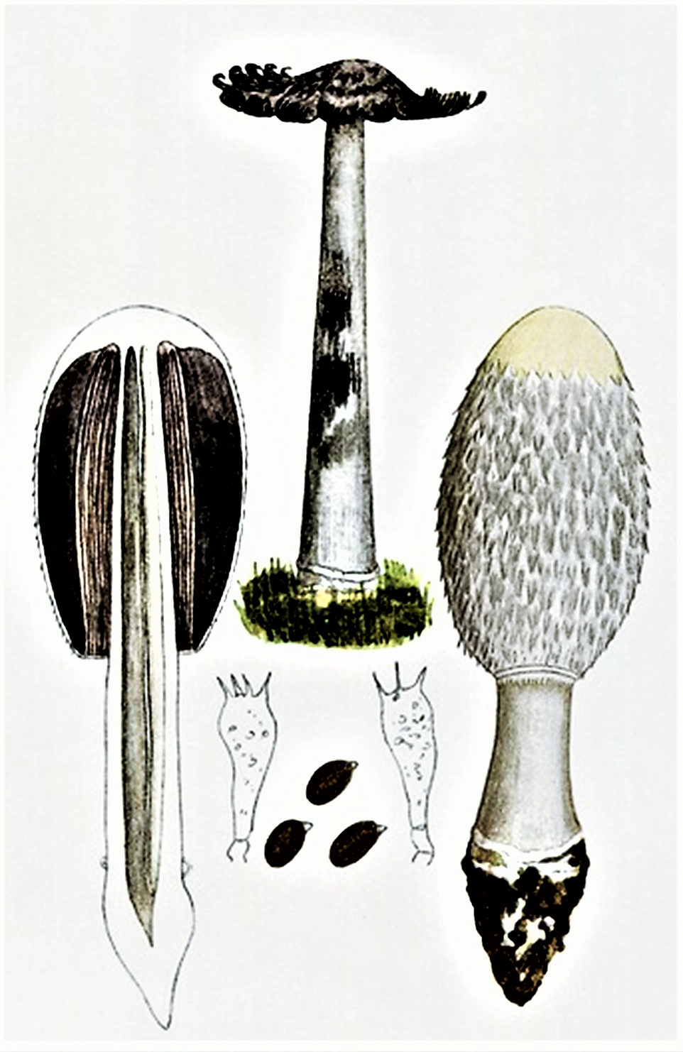 Giacomo Bresadola: Coprinus comatus (O.F.Müll., 1780) Pers. (1797)